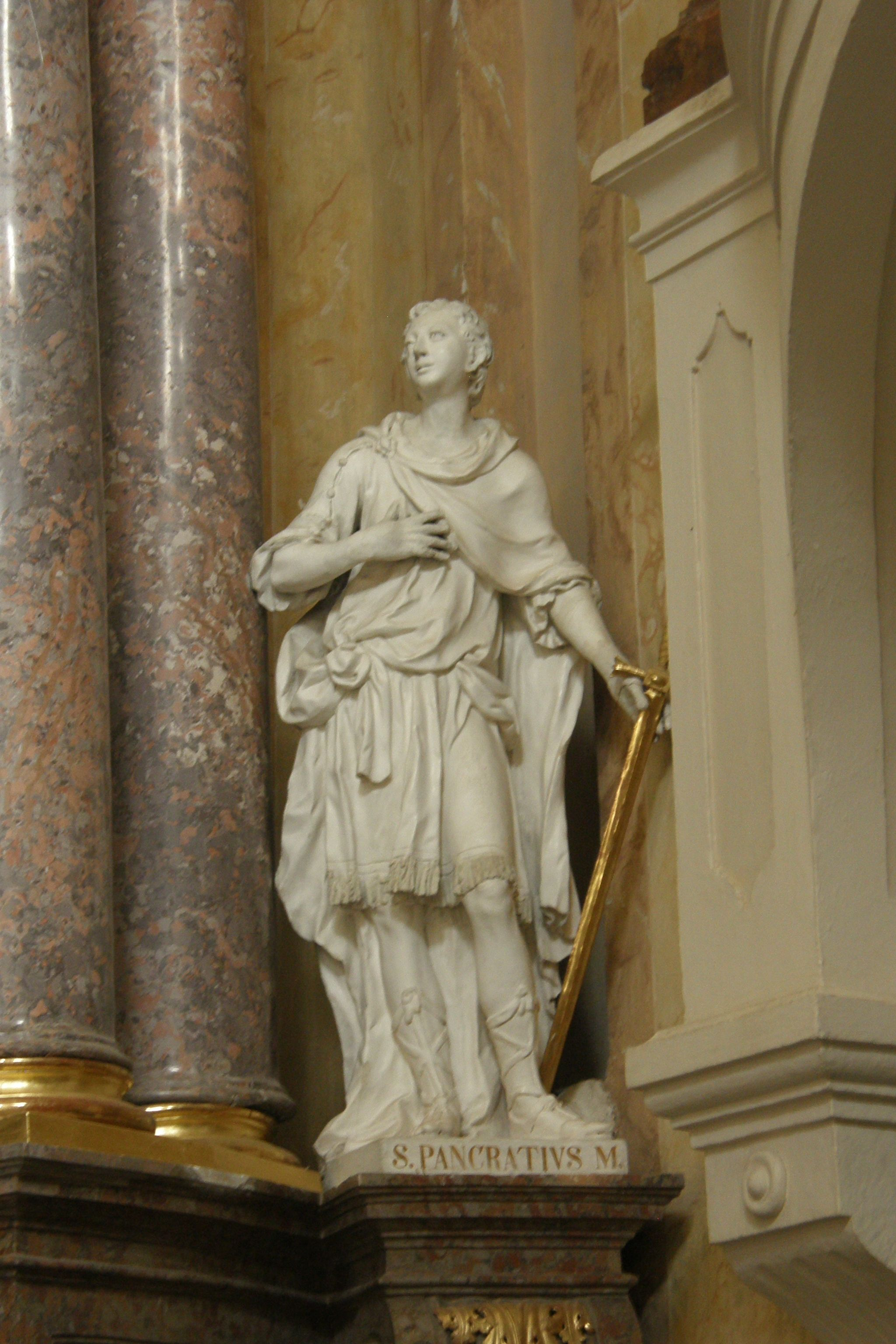 klášter paulánů (Vranov), Vranov 6